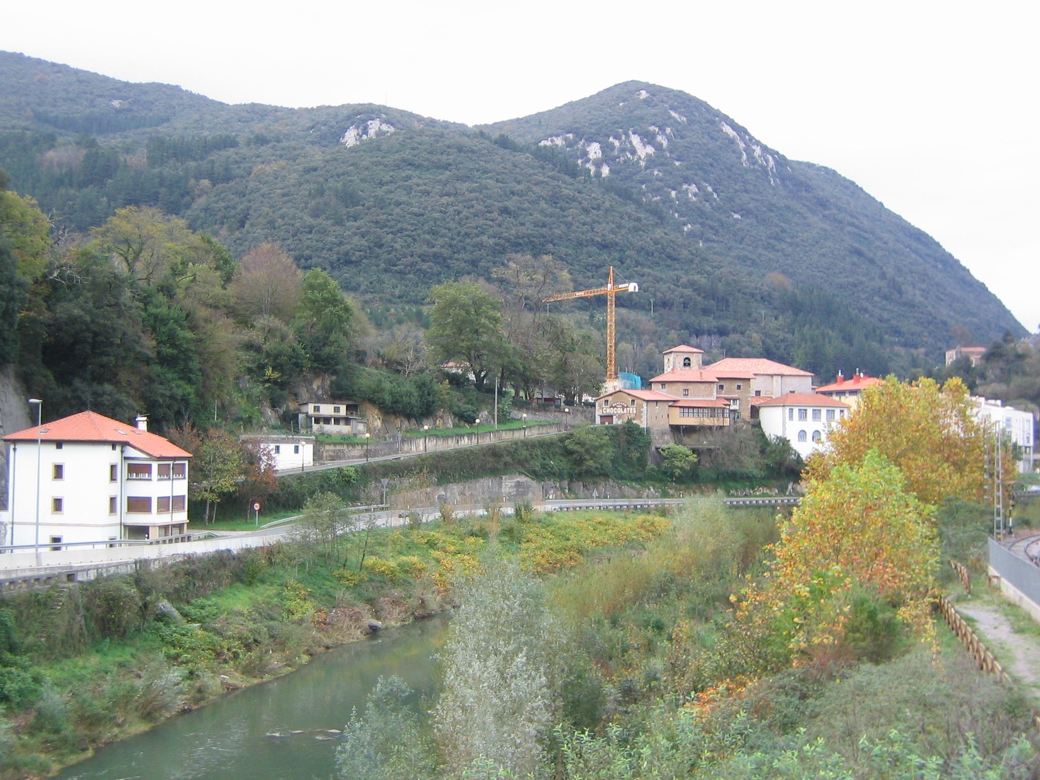 Vista parcial de Mendaro en Guipúzcoa, País Vaco, España.